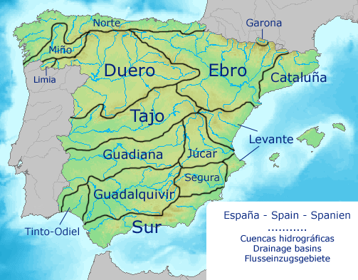 Cuencas hidrográficas en España / Spanish drainage basins